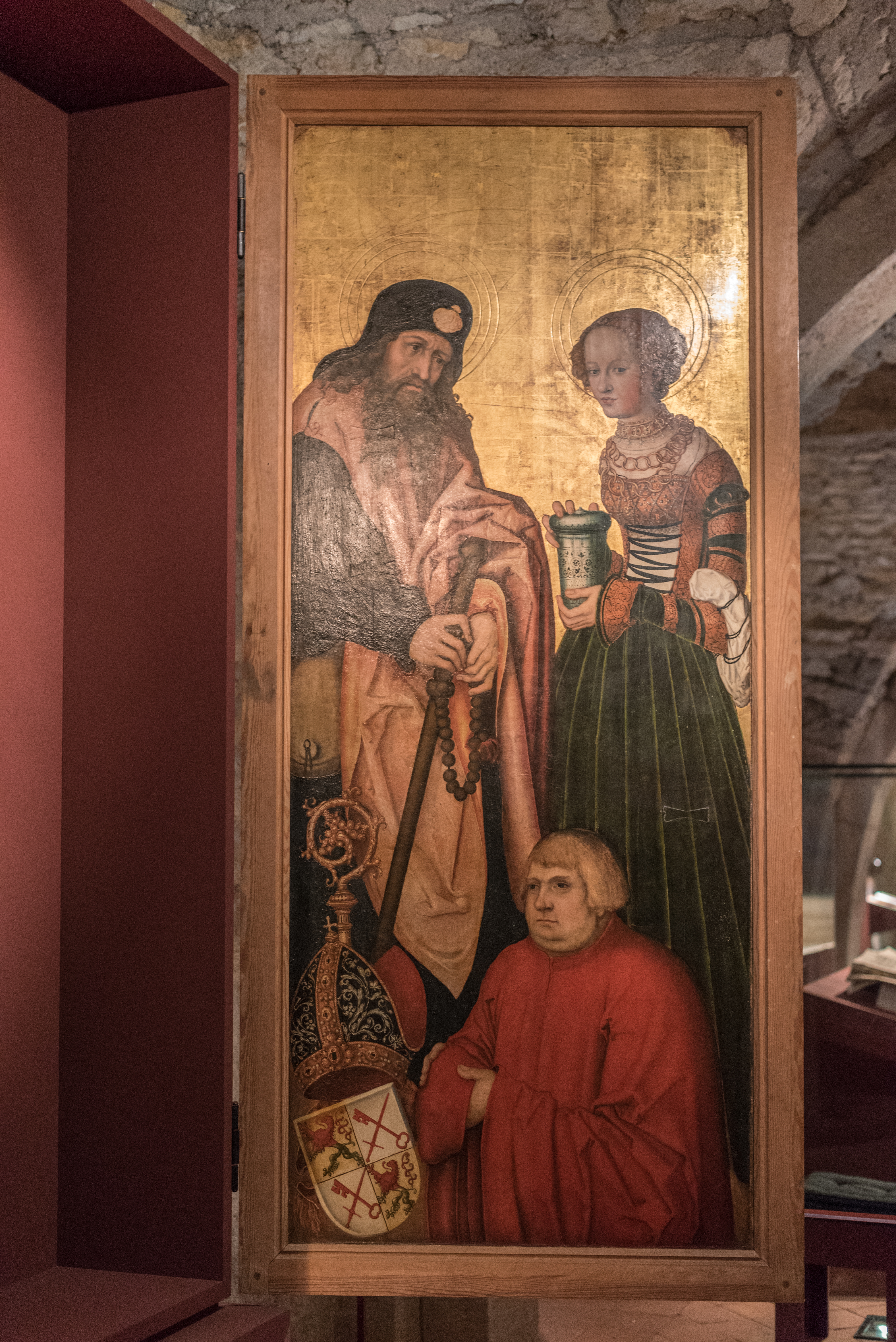 Naumburg, Dom, Domschatzkammer, Ehemaliger Westchoraltar